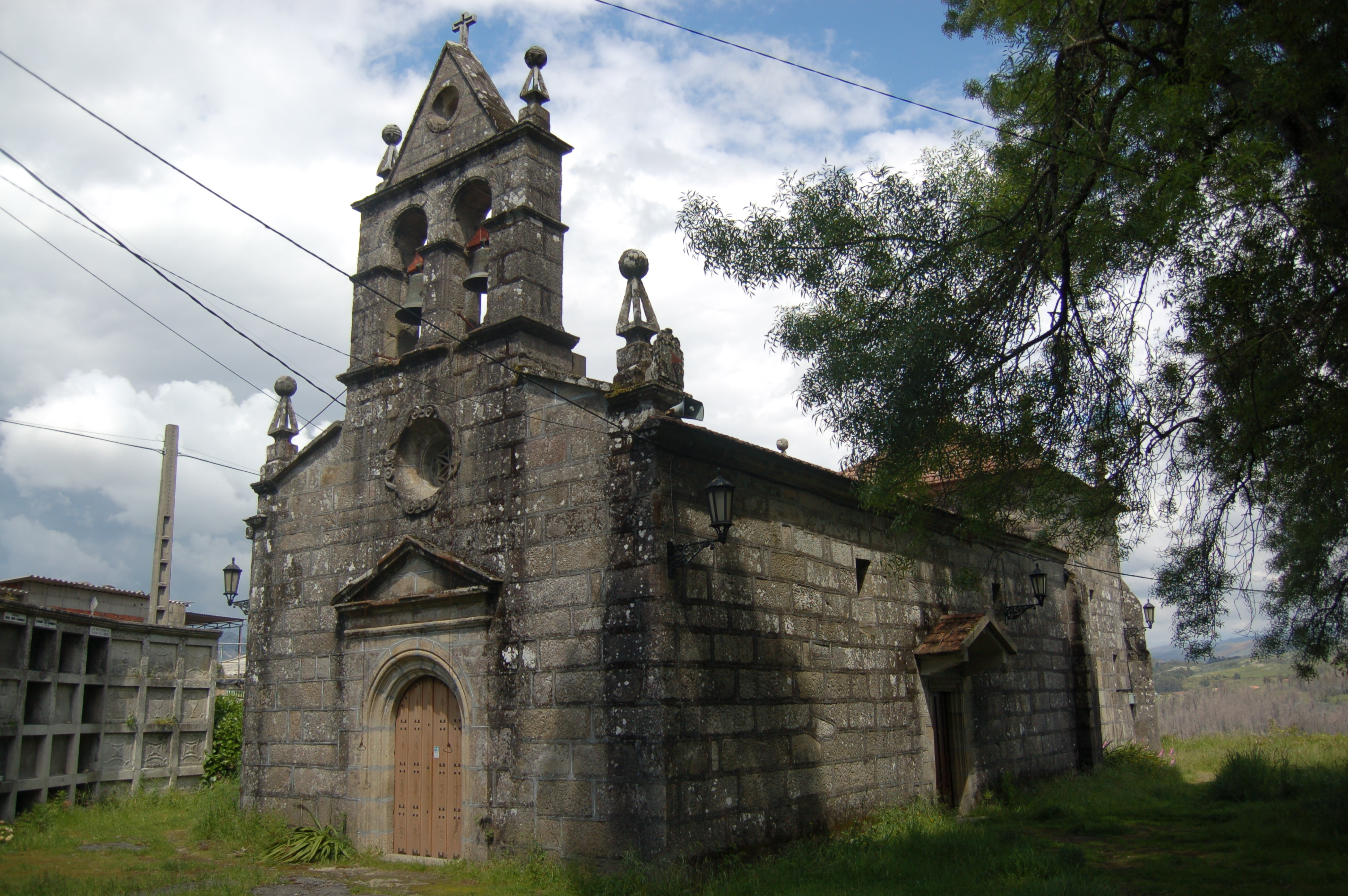 Igrexa parroquial de Santiago de Taboadelo (Ponte Caldelas)